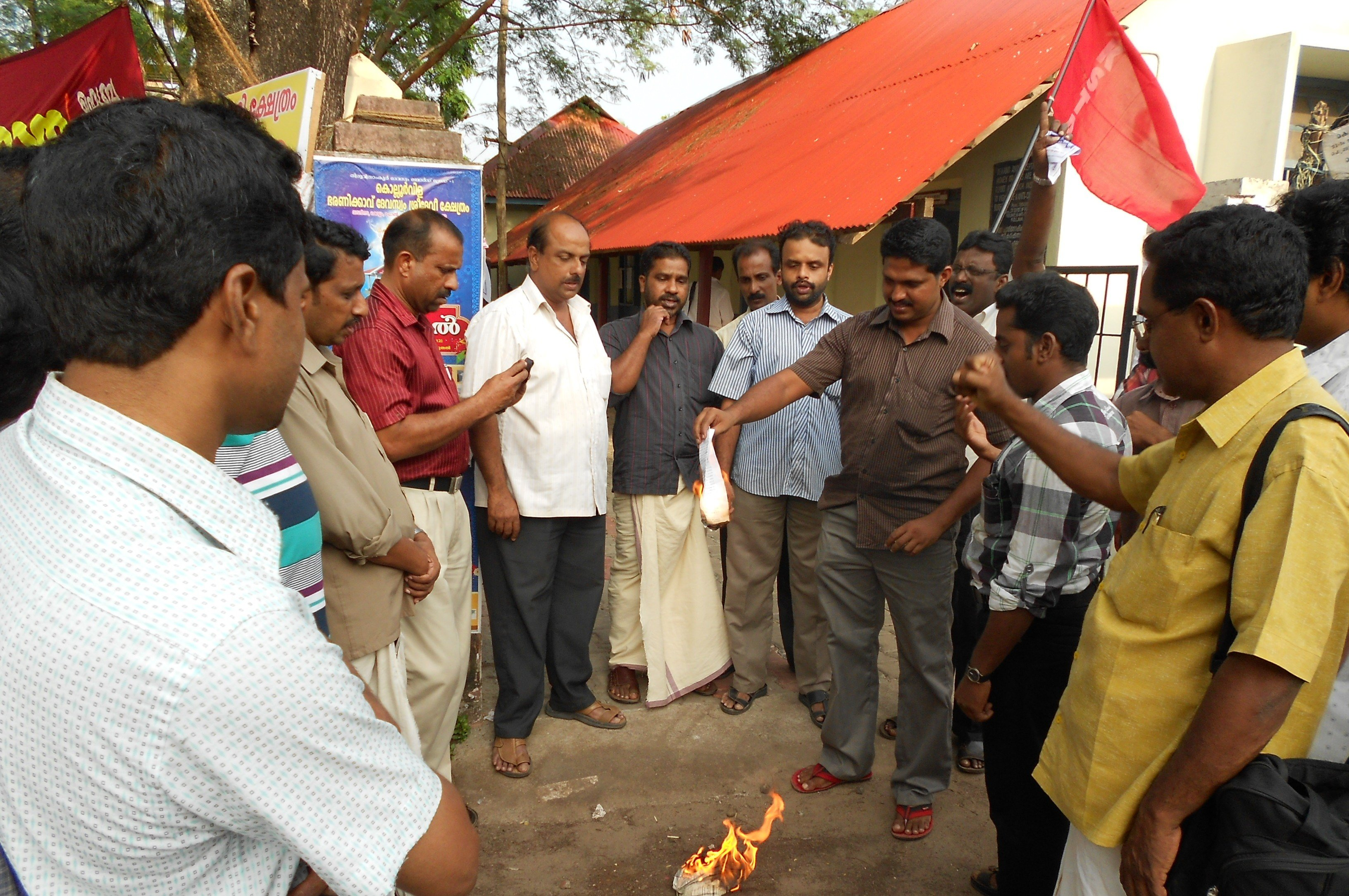 നിലവിലുള്ള അദ്ധ്യാപകര്‍ക്ക് യോഗ്യതാ പരീക്ഷ ഏര്‍പ്പെടുത്തിയതില്‍ പ്രതിഷേധിച്ച് കെ.എസ്.ടി.എ പ്രവര്‍ത്തകര്‍ ഉത്തരവ് കത്തിക്കുന്നു.